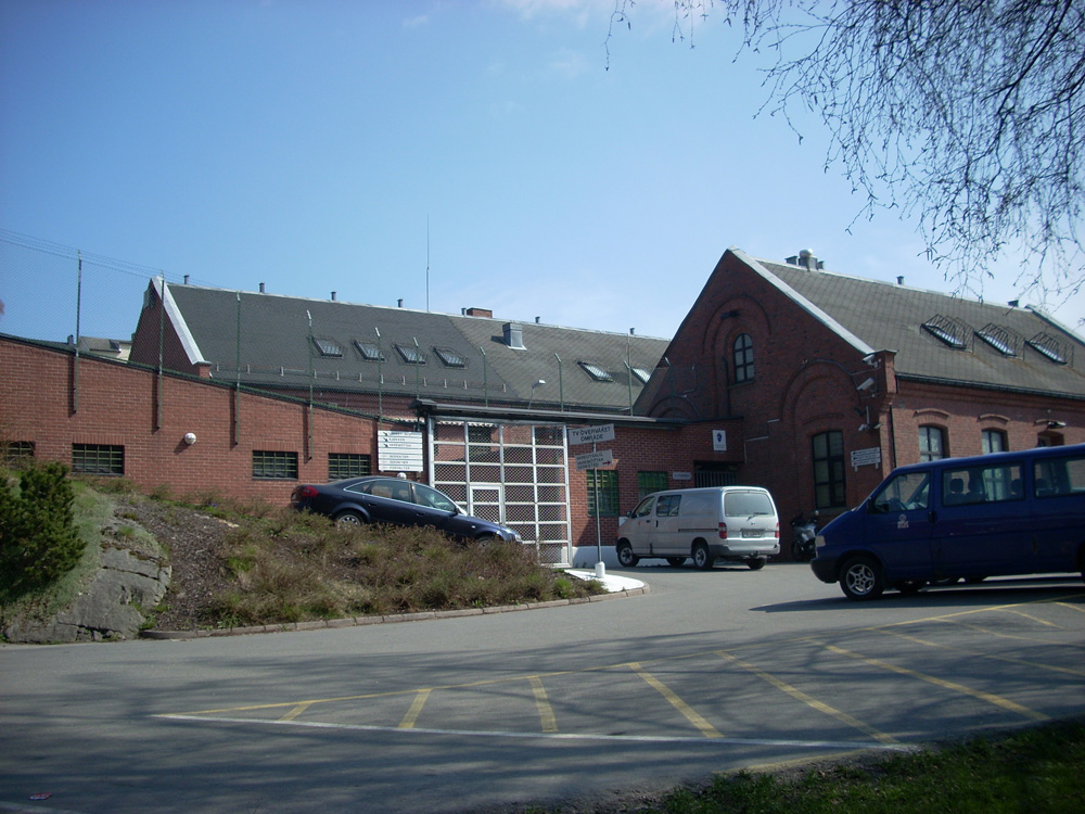 Arendal fengsel, Blødekjær, Arendal